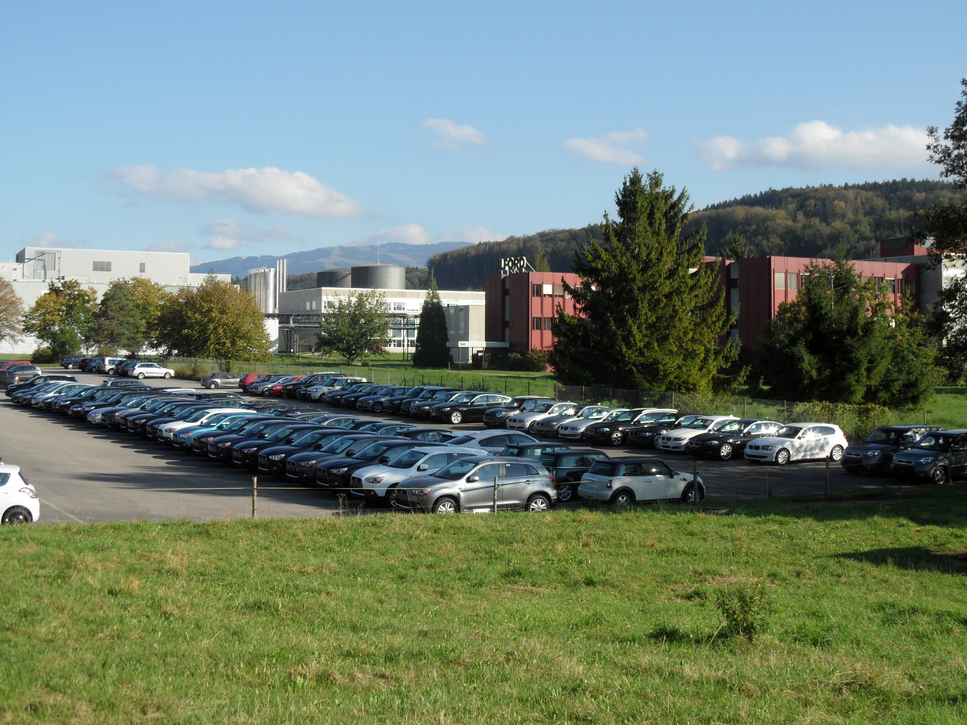 Bâtiments Ilford dans la zone industrielle le long de la Gérine à Marly, canton de Fribourg en Suisse.